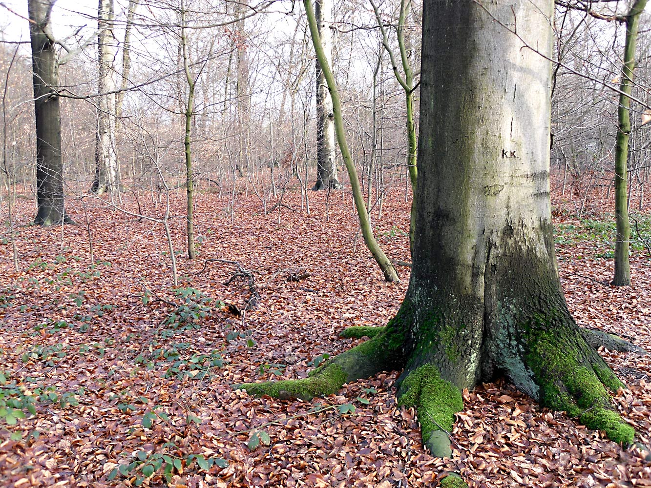 Wald Benrath, Forst Benrath, лес Бенрат.